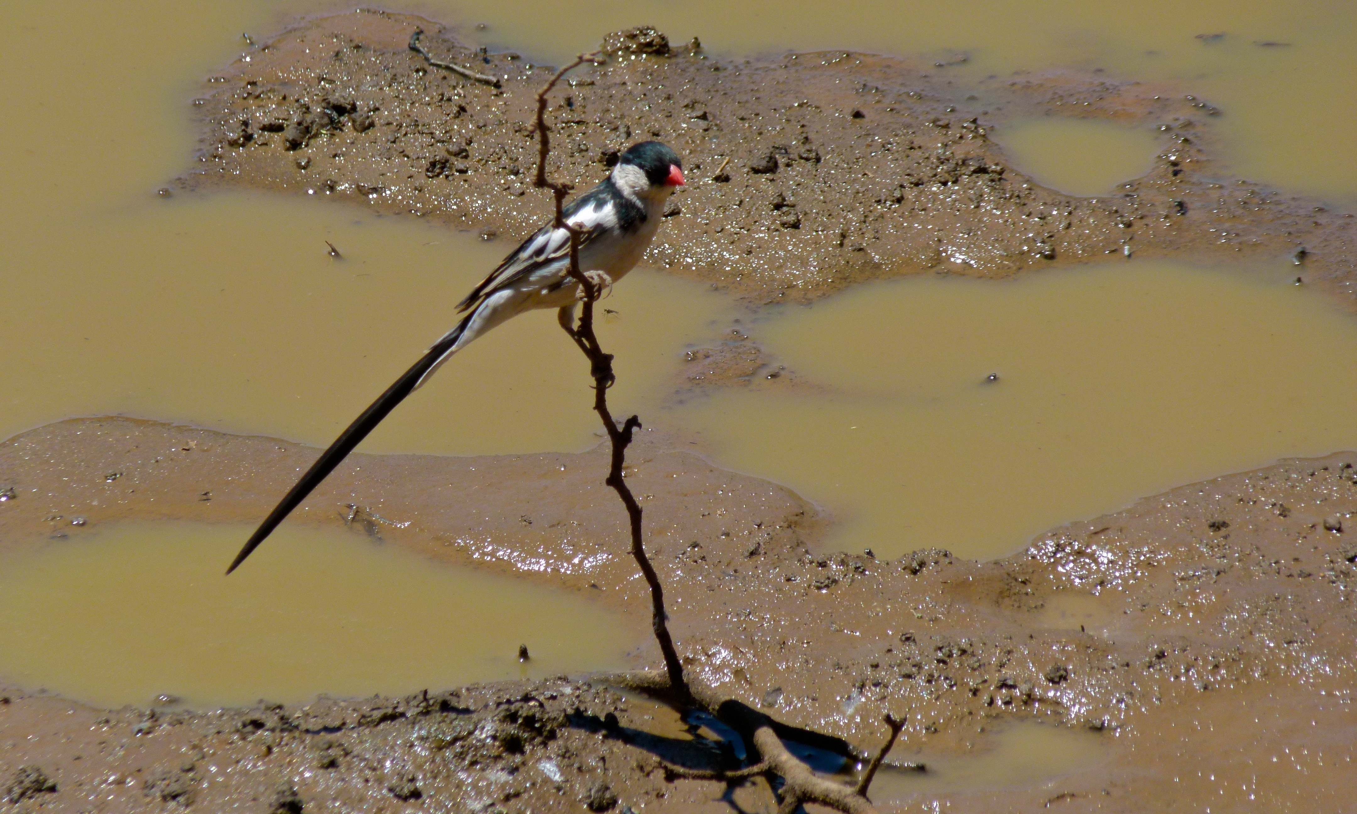 Stofdam Bird Hide, Mokala NP, SOUTH AFRICA